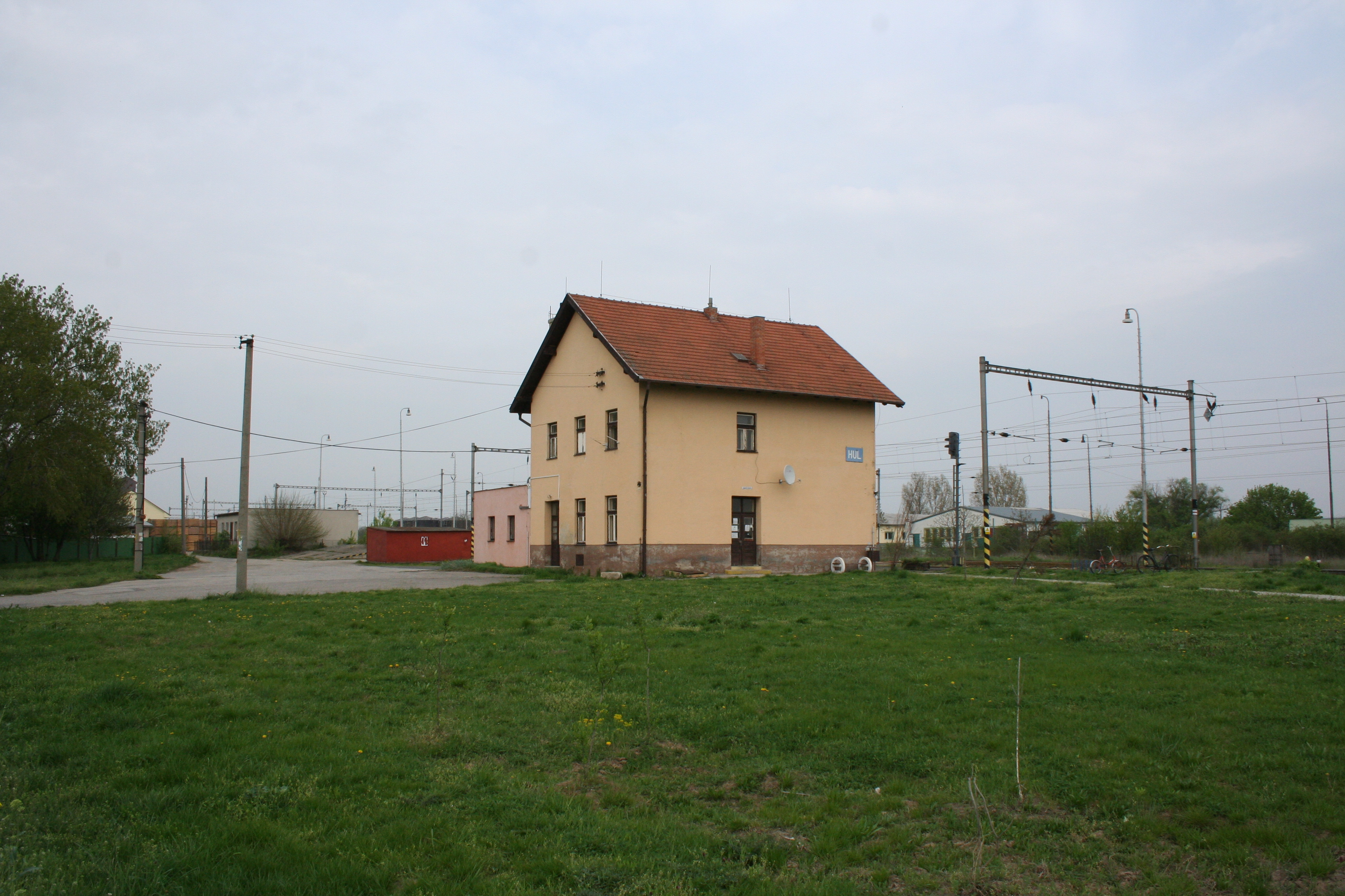 Hull falu